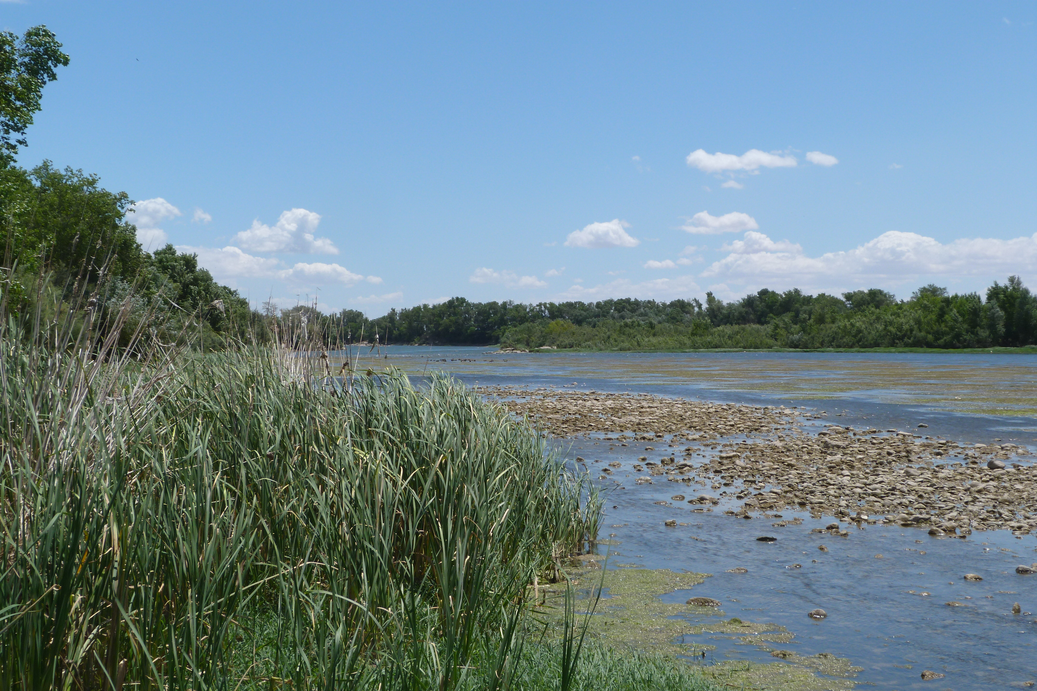 Reserva Natural de Los Galachos de La Alfranca de Pastriz, La Cartuja y El Burgo de Ebro This is a photography of a Site of Community Importance in Spain with the ID: ES2430152. Natura2000 entry, EEA entry